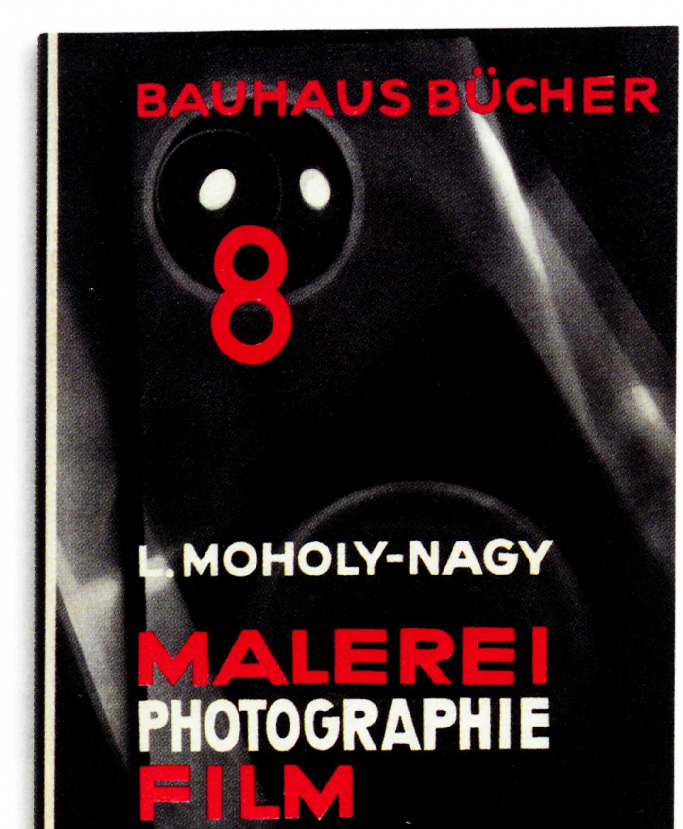 László Moholy-Nagy Malerei Umschlag 1925